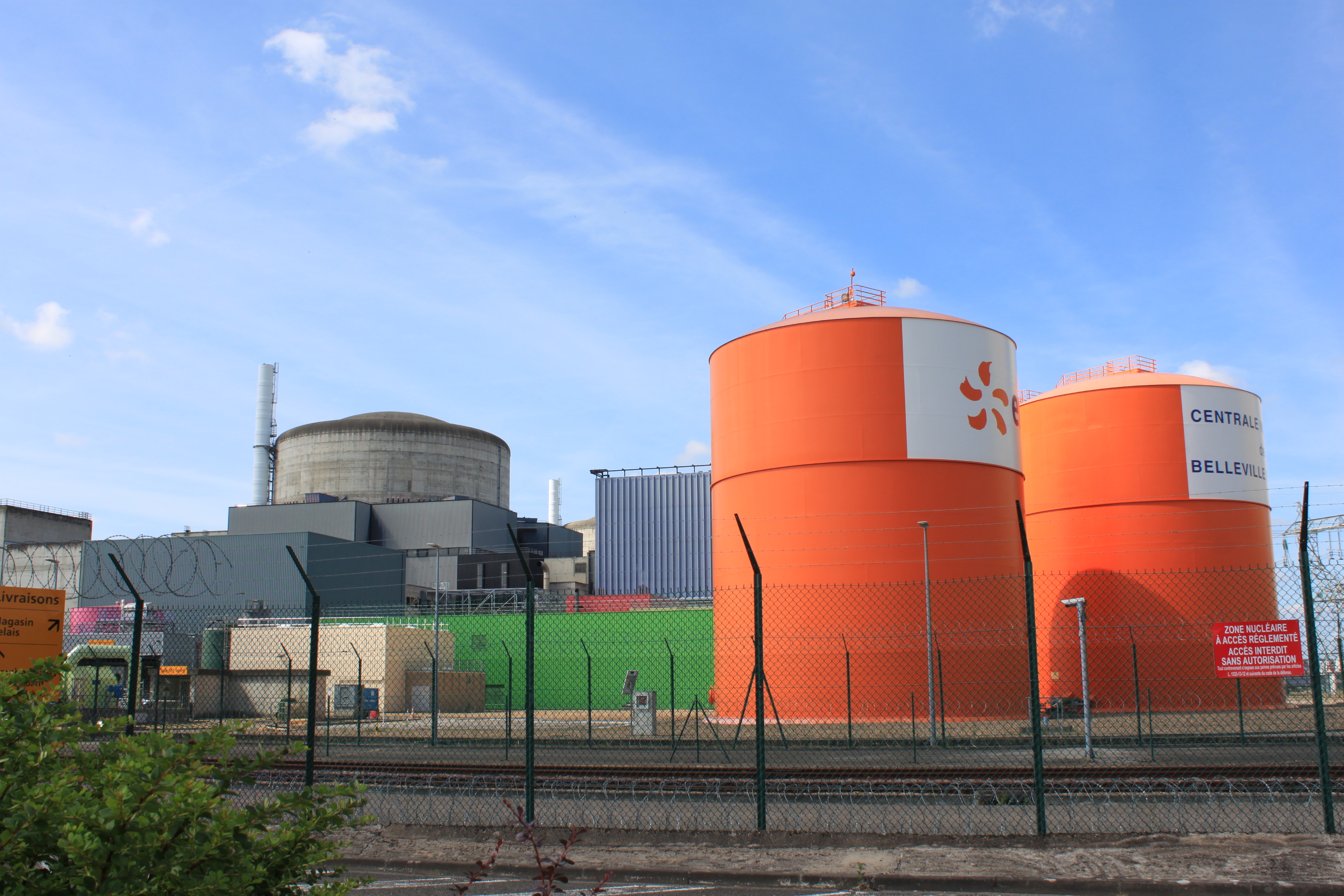 Centrale de Belleville-sur-Loire, France